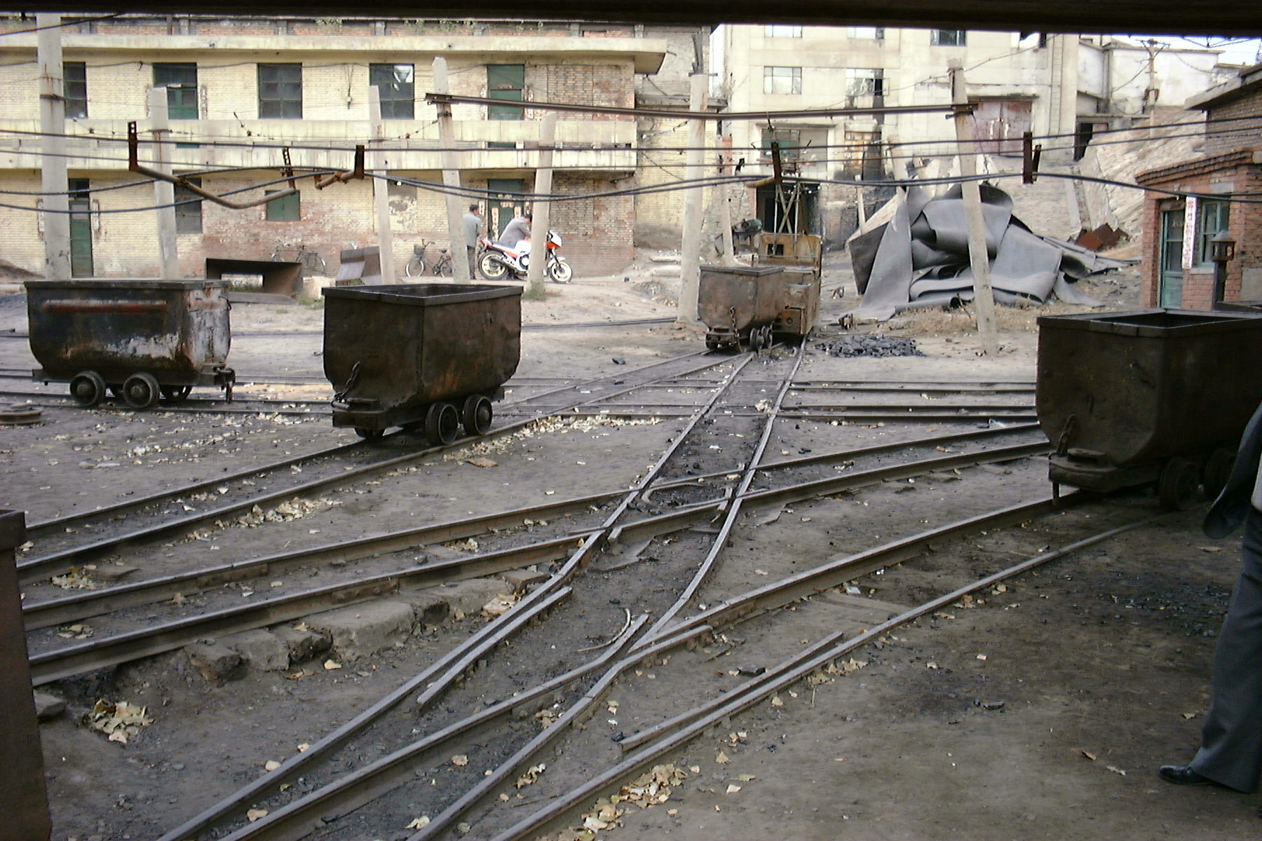 Jin Hua Gong Mine, Datong, Shanxi, China